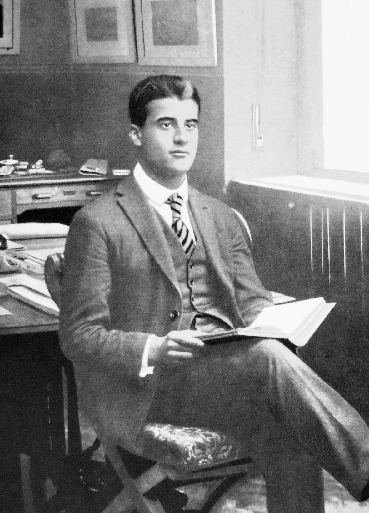 Pier Giorgio Frassati, à son bureau d'après le livre une vie en image de Luciana Frassati